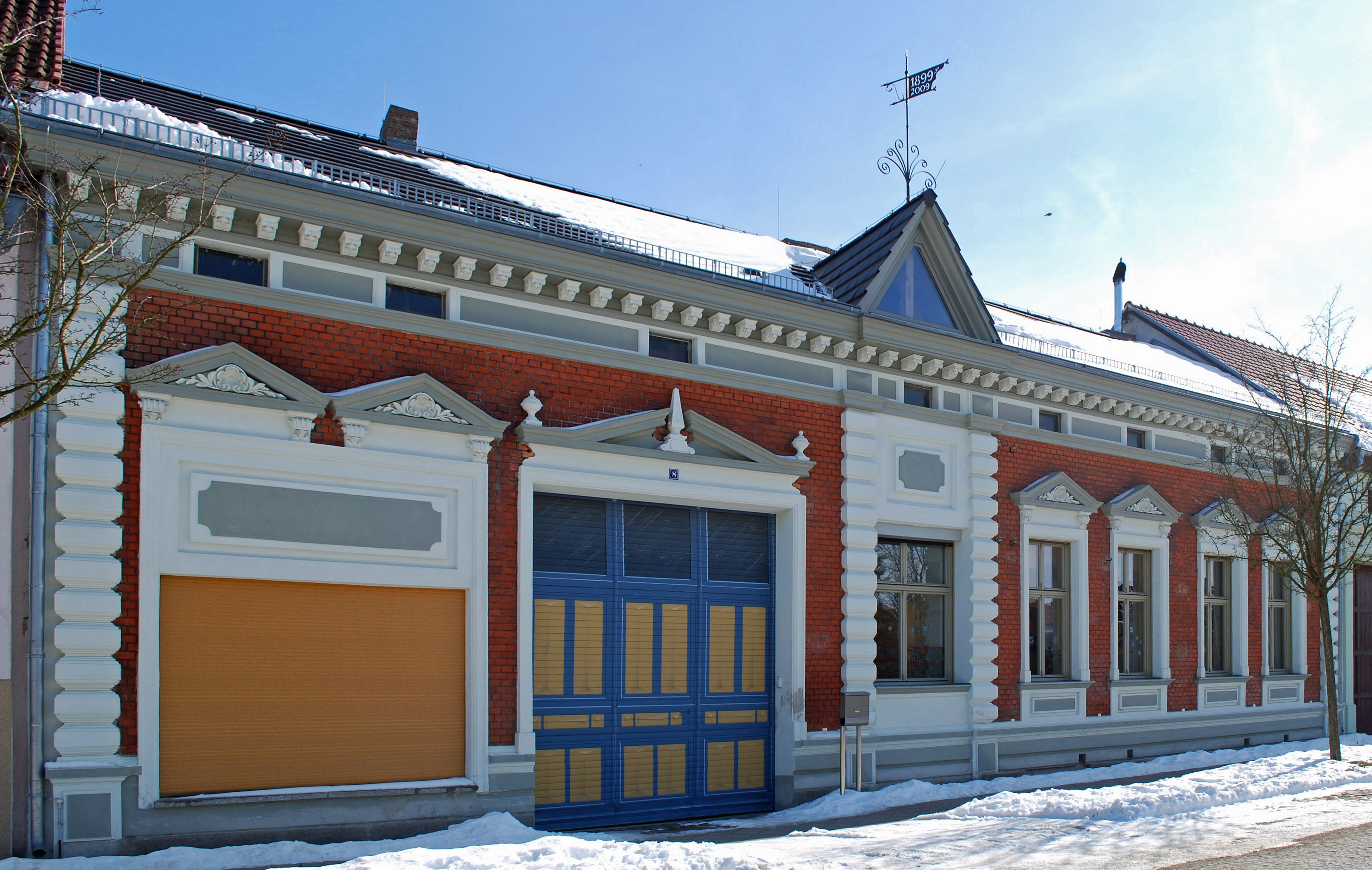 Gebäude und Denkmal in der Uckermark. (Altkreis Angermünde)